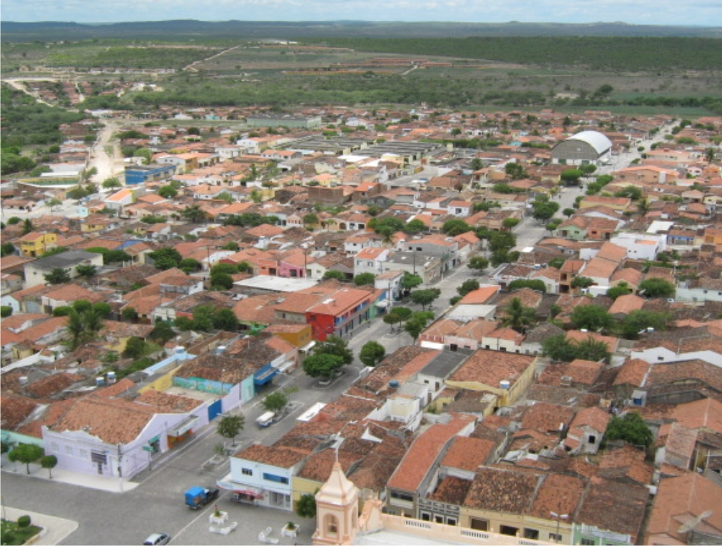 Centro de Pocinhos